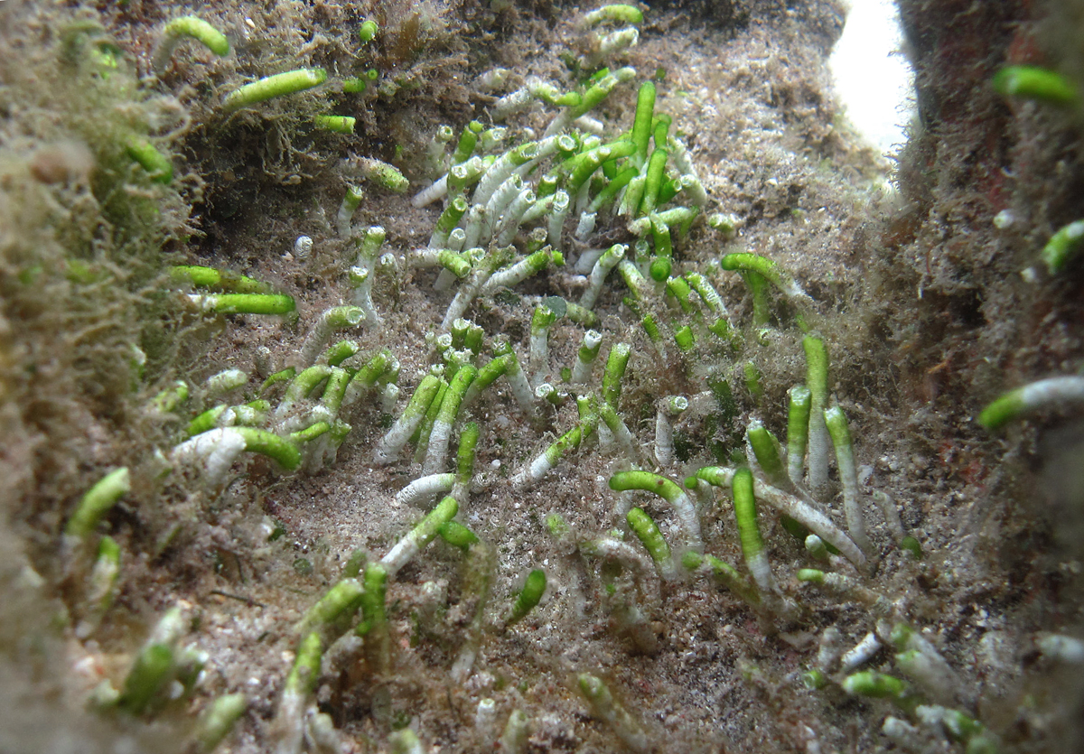 L'algue Neomeris vanbosseae à la Réunion.